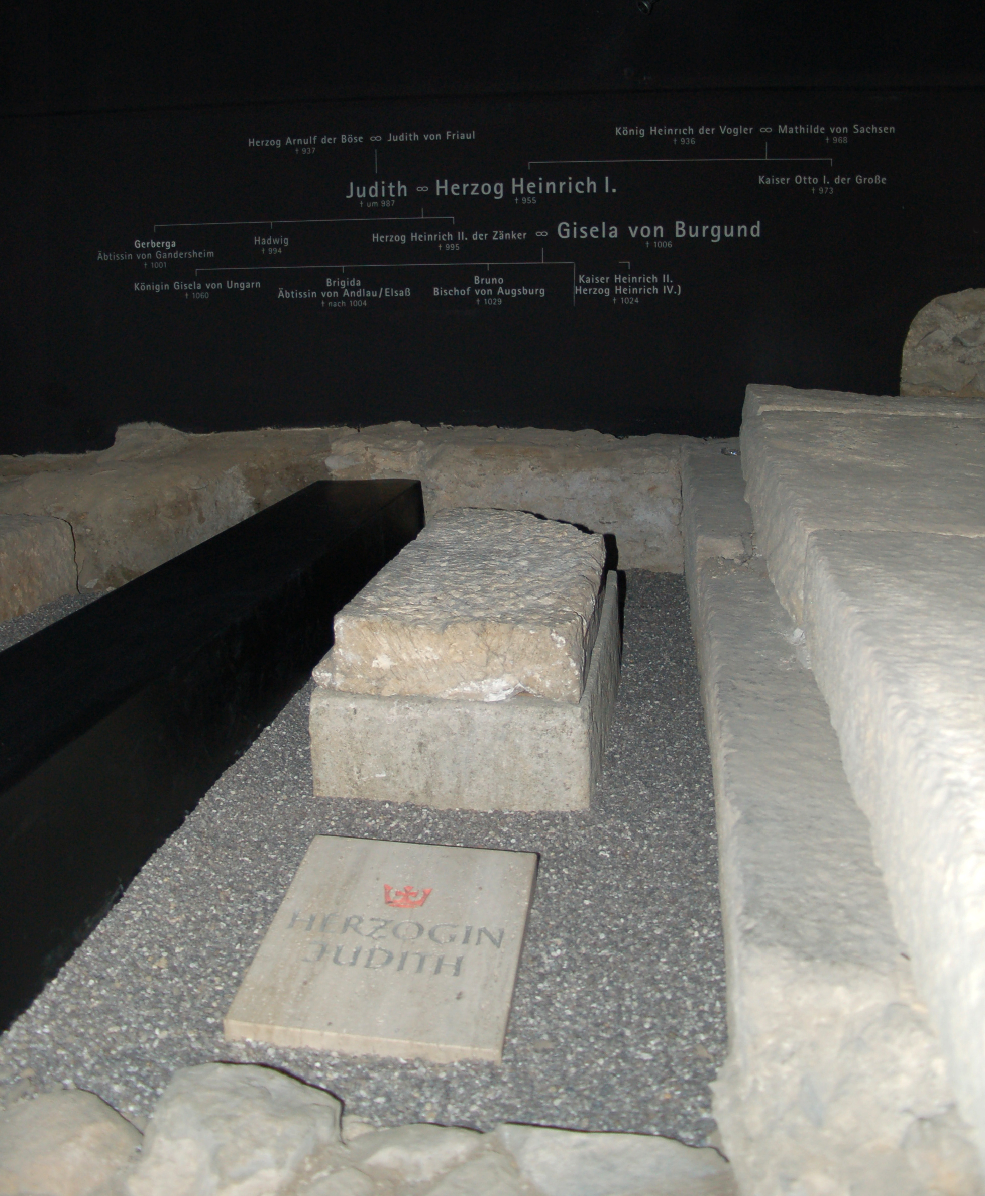 Grabstätte der bayerischen Herzöge.